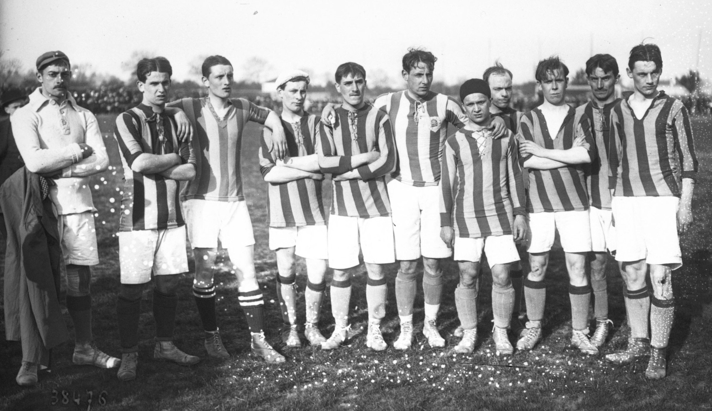 26-4-14, Charentonneau, finale du Trophée de France de football, Equipe V.G.A. du Médoc.